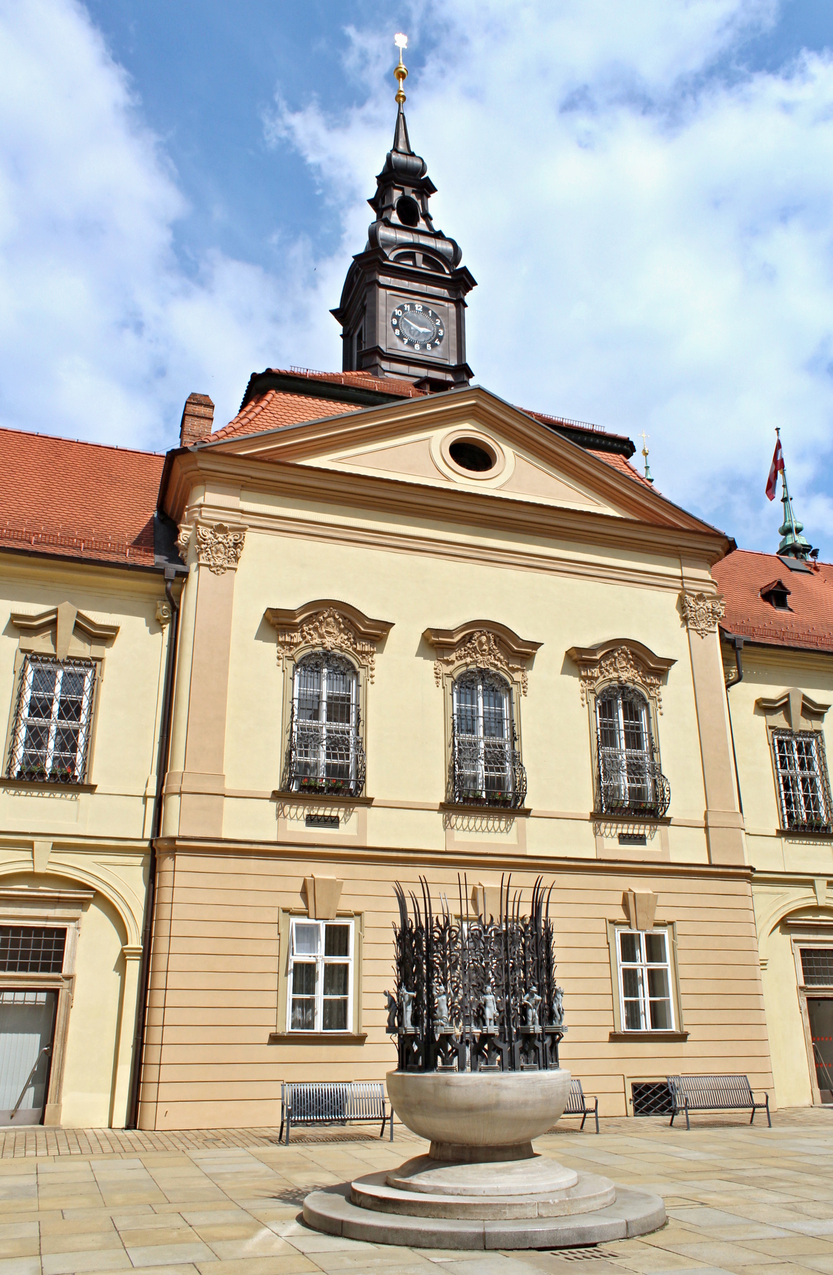 Nová radnice v Brně